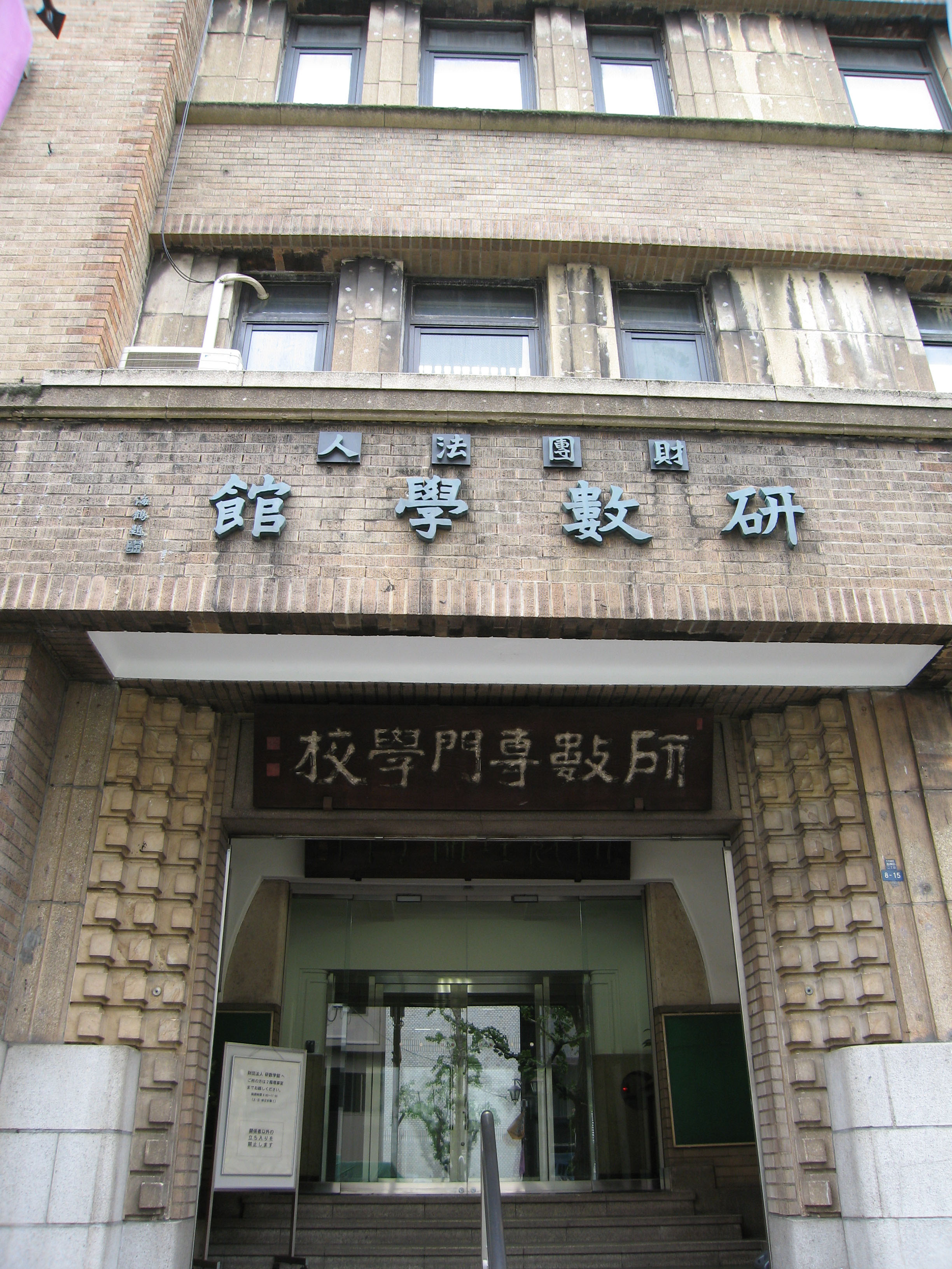 "Kensu Gakkan Foundation" Tokyo , Japan